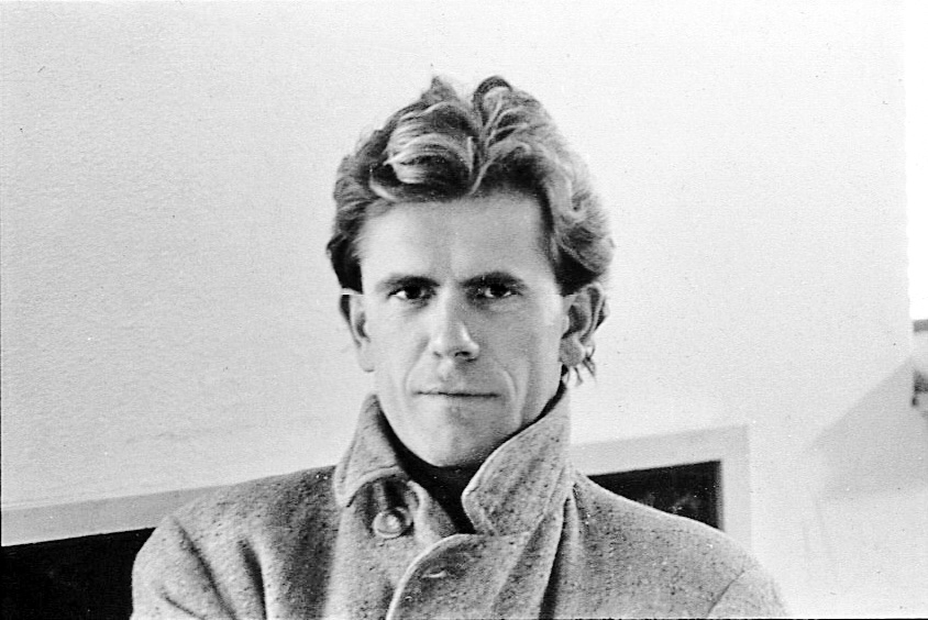 Radboud van Beekum 1983